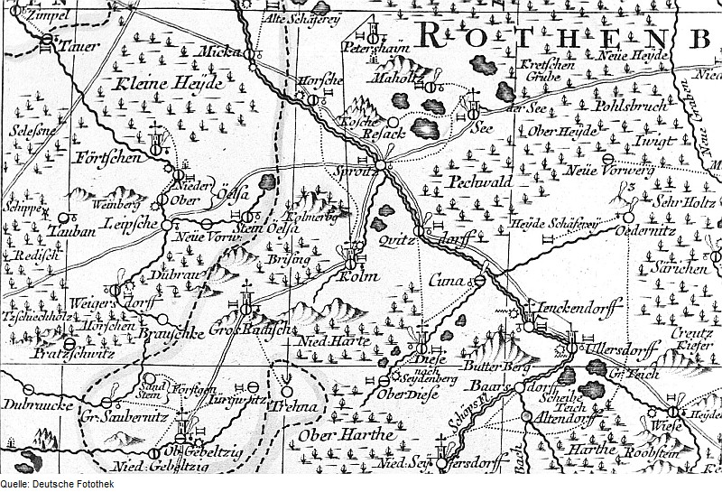 Original image description from the Deutsche Fotothek Hohendubrau-Dauban. Oberlausitzkarte, Schenk, 1759